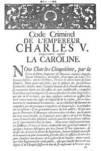 1er page du code criminel de l'empereur Charles V dite la caroline